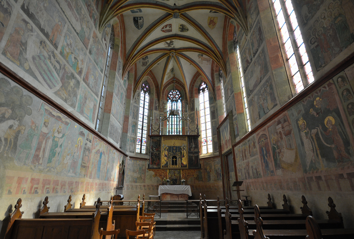 Jakub ve Slavětíně